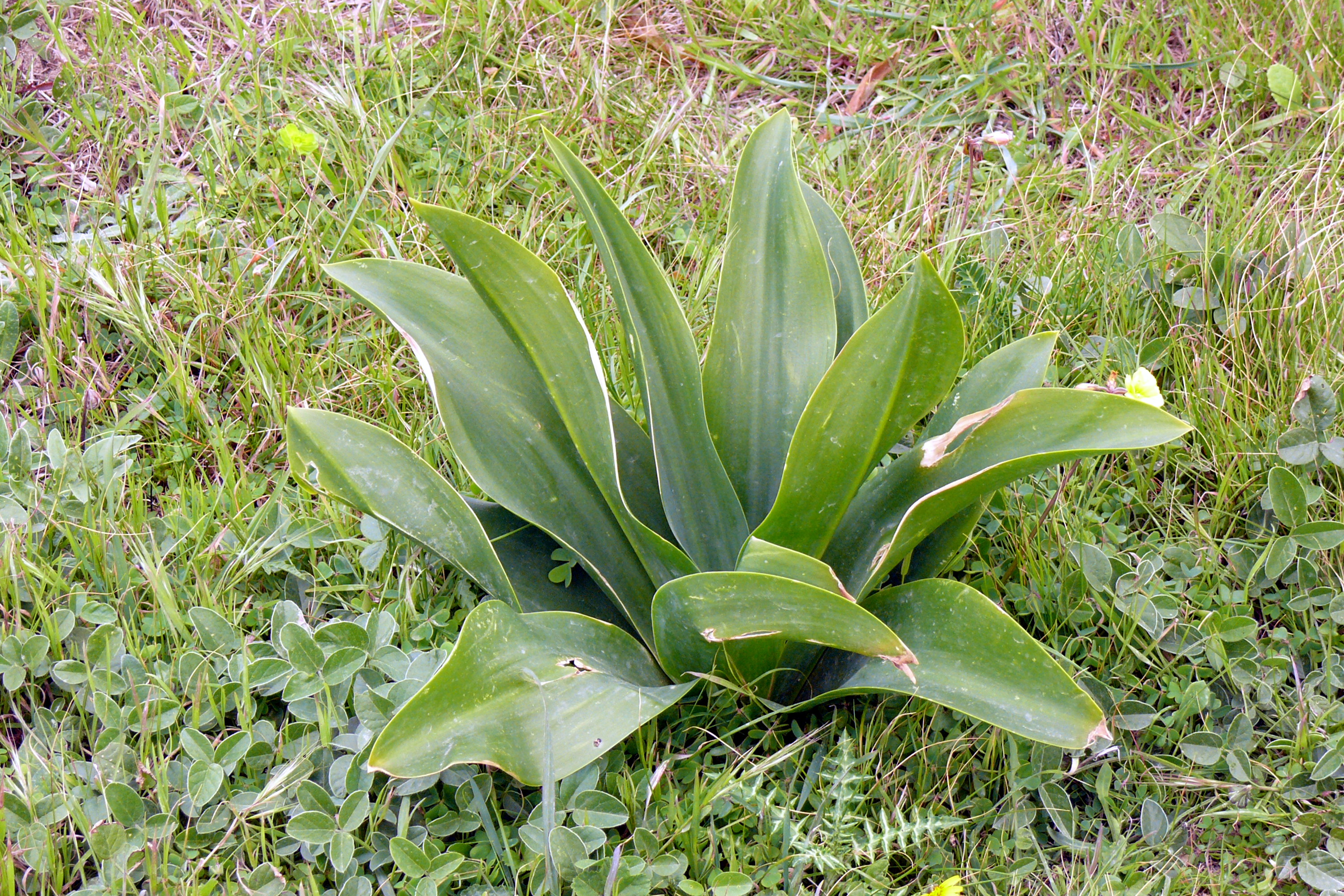 Meerzwiebel (Urginea maritima) aus Malta